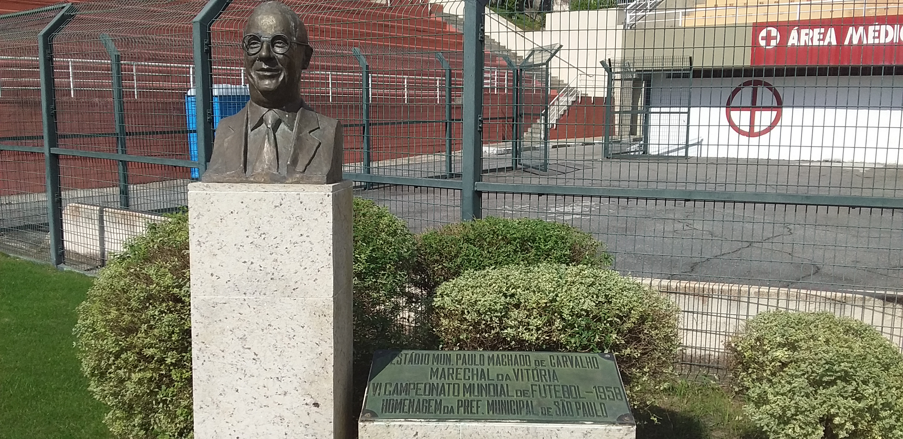 Busto de Paulo Machado de Carvalho localizado no Estádio do Pacaembú, batizado oficialmente com seu nome em sua homenagem.